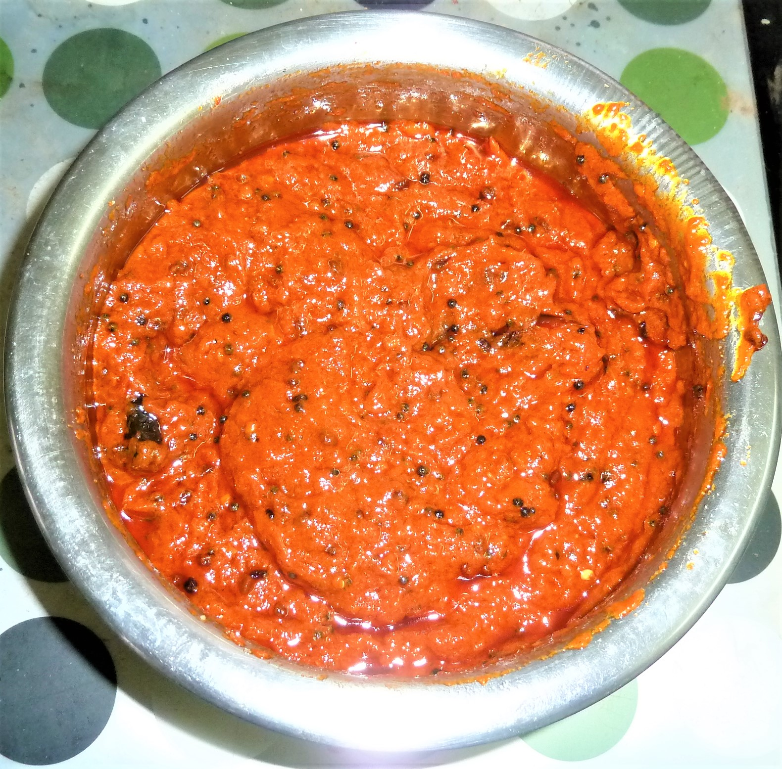 టమాటా పచ్చడి